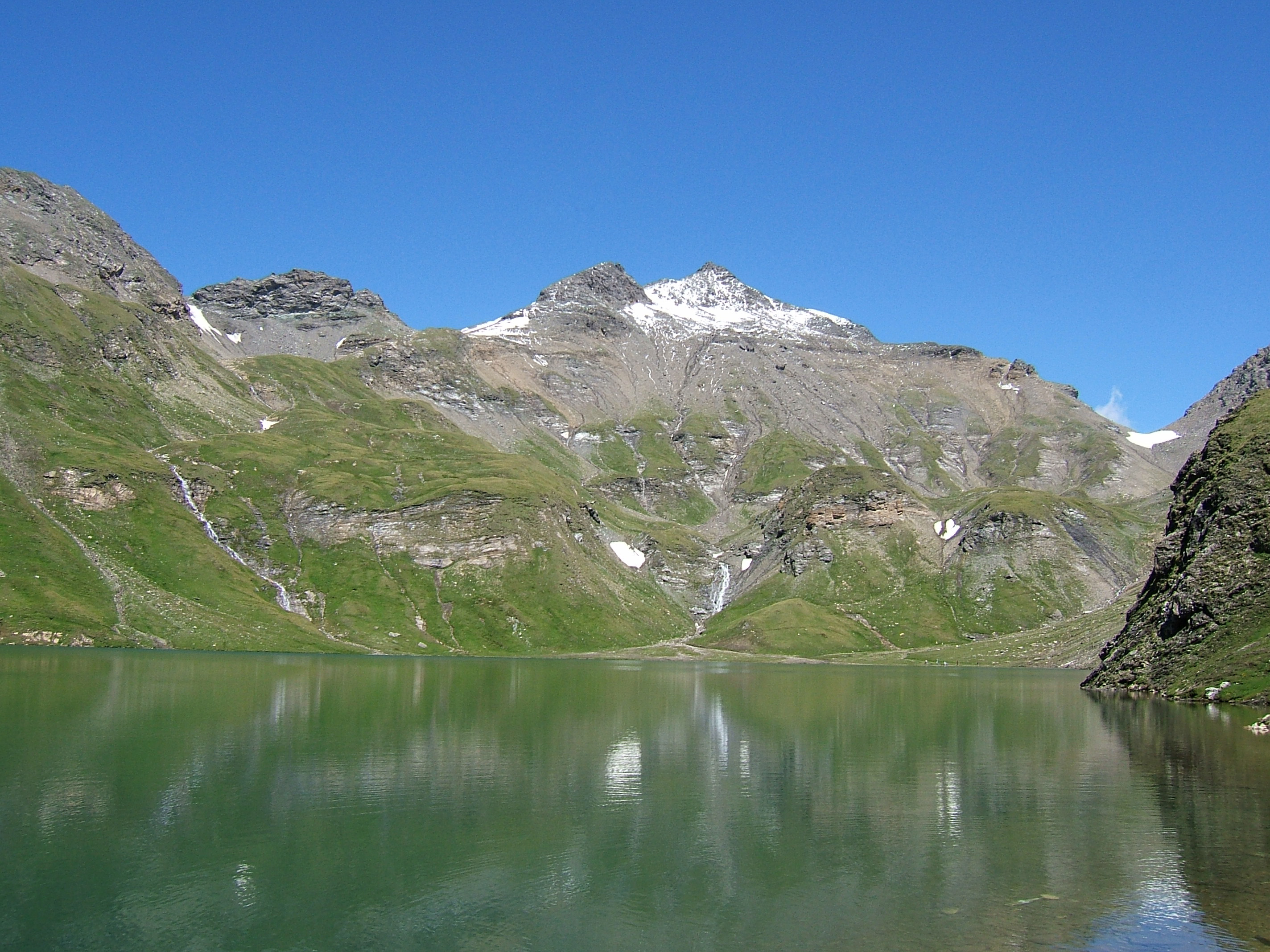 Wilde Kreuzspitze mit Wildem See